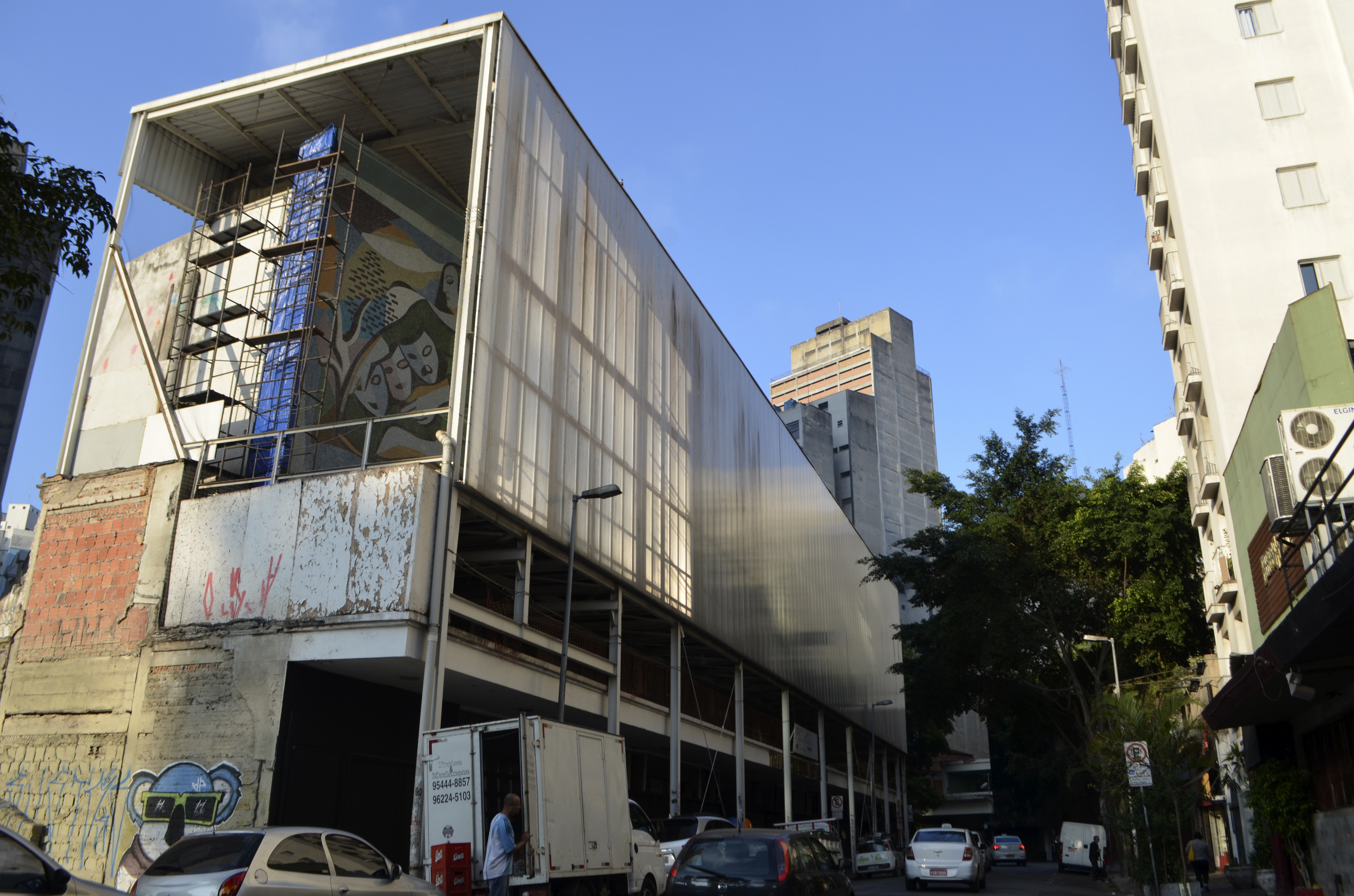 Restauração do painel da fachada do Teatro Cultura Artística, em São Paulo (SP), Brasil